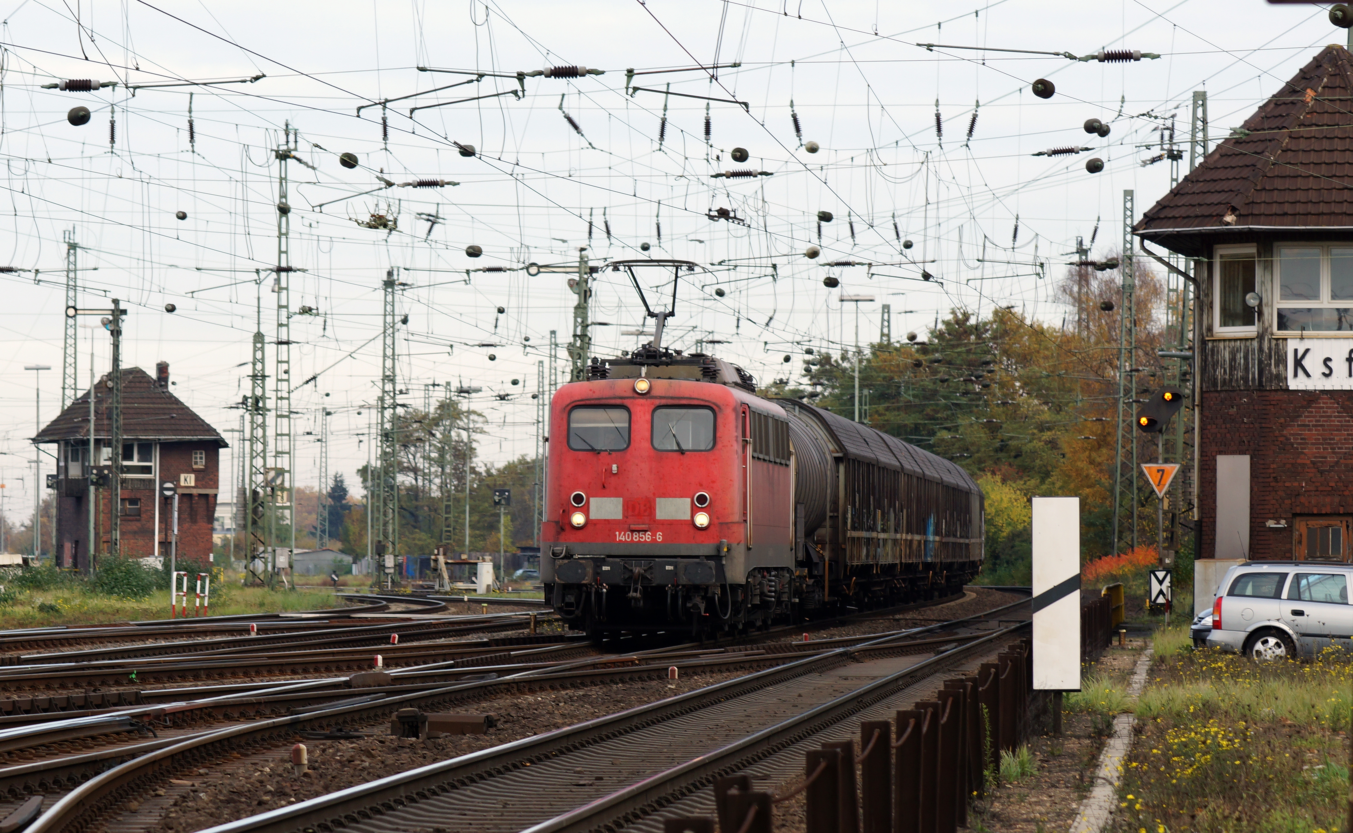 BayernBahn 140 856-6 mit einem Güterzug in der Nähe des Rangierbahnhofs Köln-Kalk Nord.